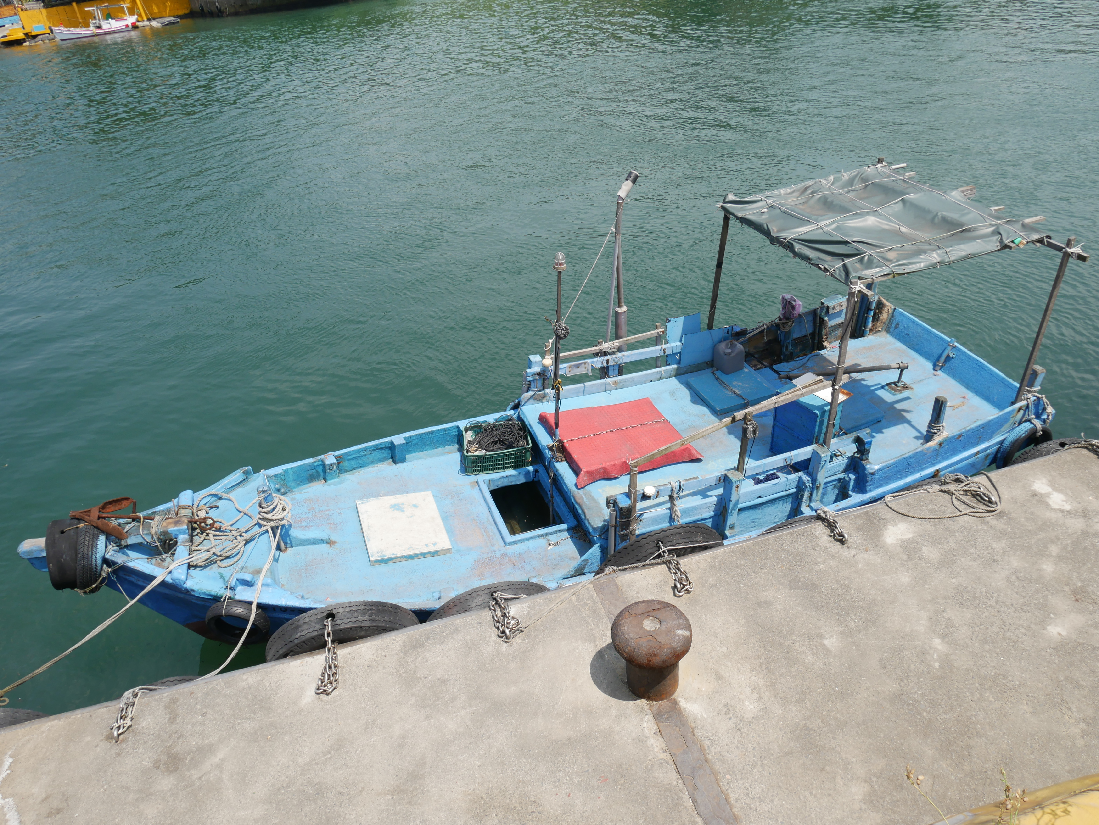 八尺門漁港漁船，基隆市中正區和憲里